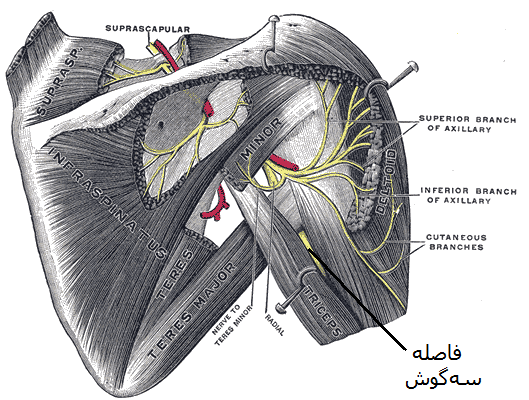 فاصله سه‌گوش